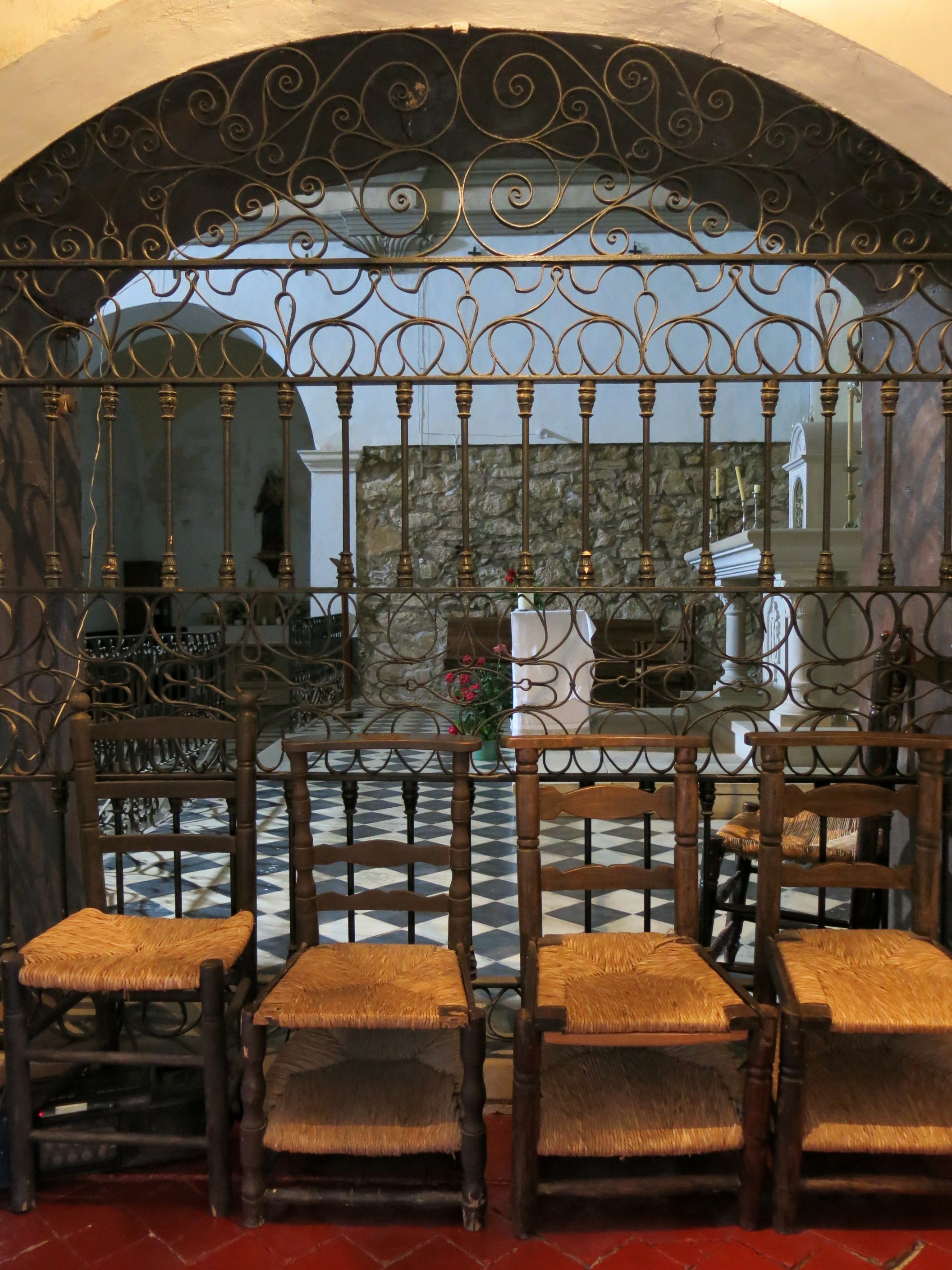 Castell de Montsonís